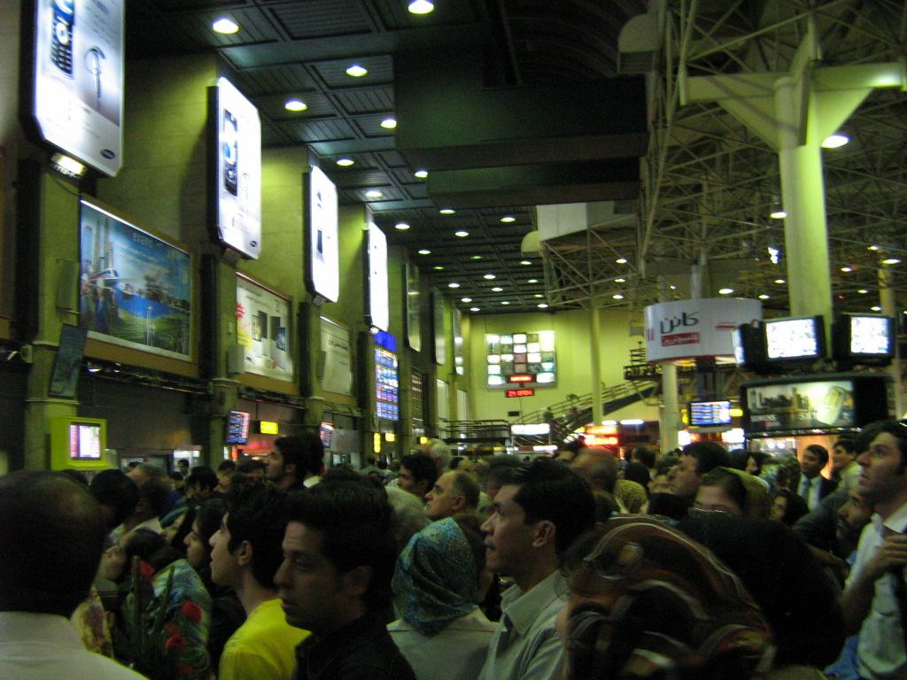 aeroport de Mehrabad